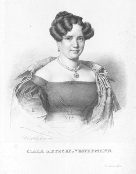 Klara Vespermann (1799–1827)